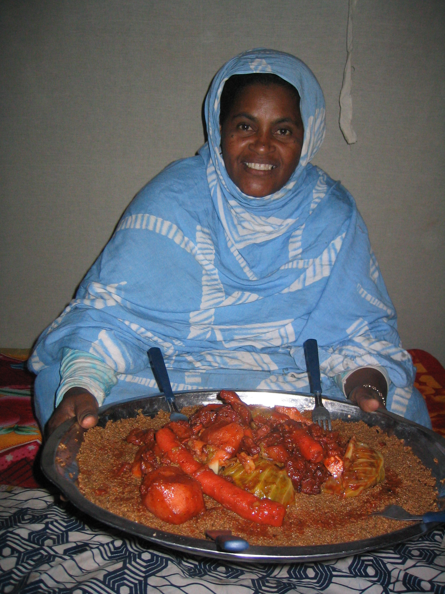 Couscous de dromadaire, réalisé sous la tente dans les dunes d'Ajouer (Mauritanie)